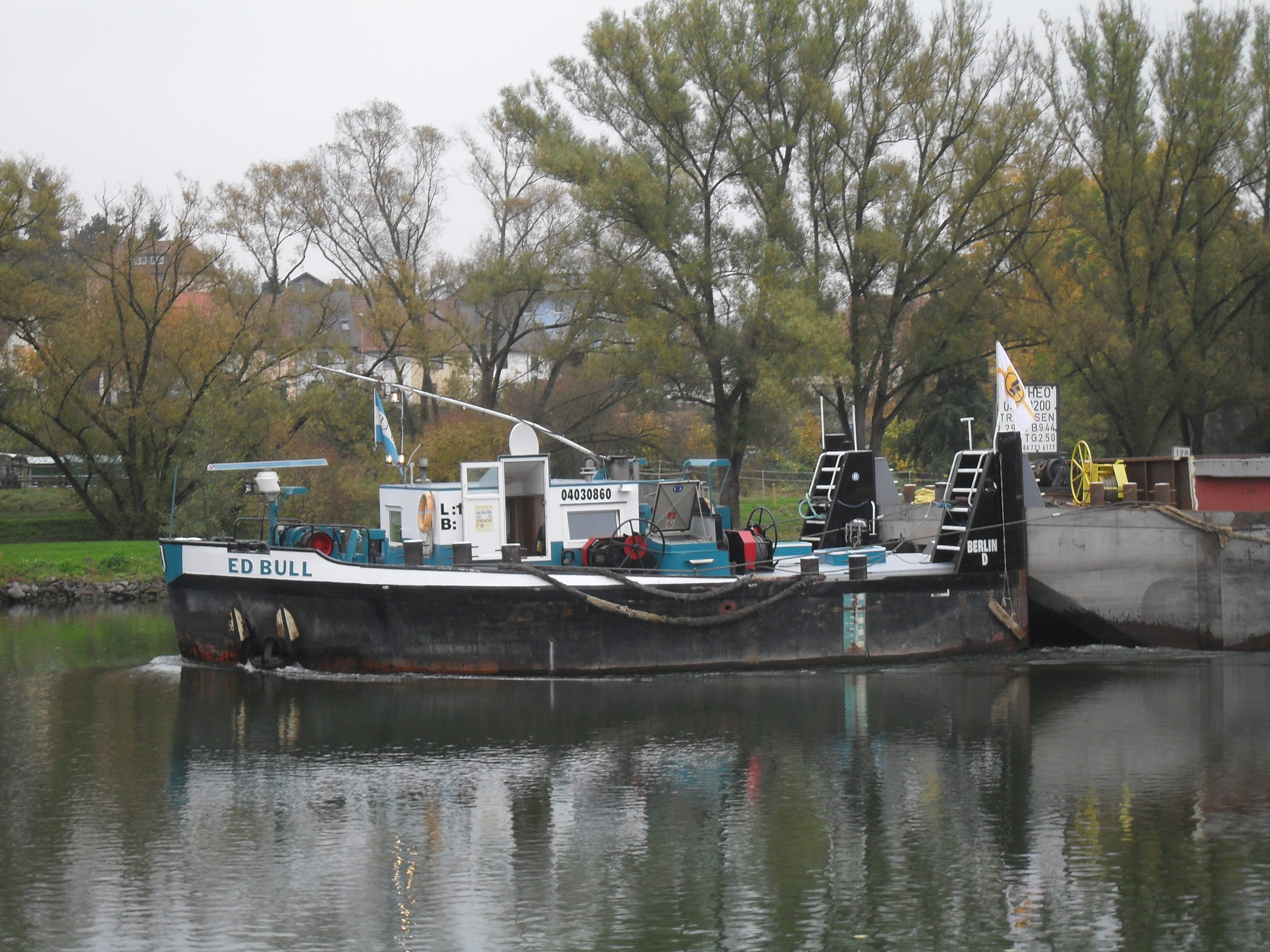 Kopfbarge Ed Bull vor einem Schubverband auf der Bergfahrt auf dem Main Karlstadt km 236,23 Straßenbrücke Karlstadt.